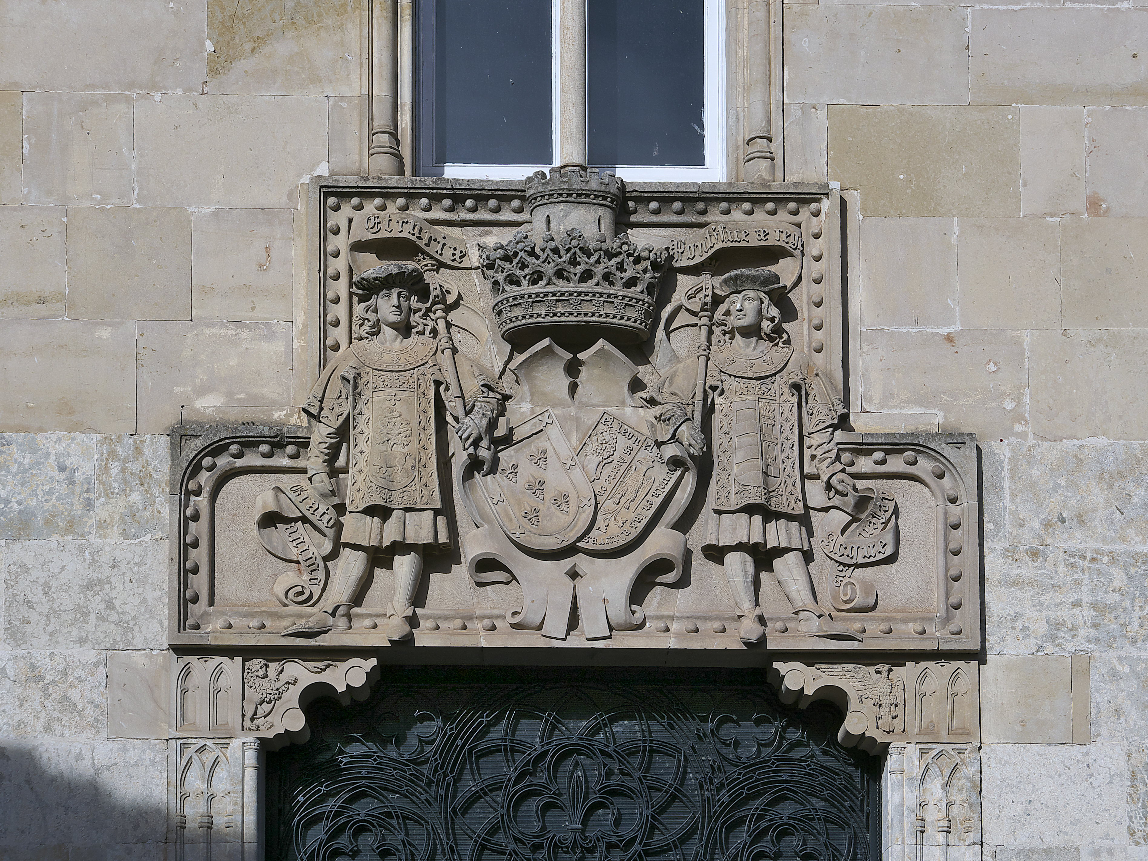 Frontispicio del Palacio de la Marquesa de Cartago, Ciudad Rodrigo. María de la Concepción Narváez y del Águila, I marquesa de Cartago (1894-1942), construye se palacio neogótico en Ciudad Rodrigo.